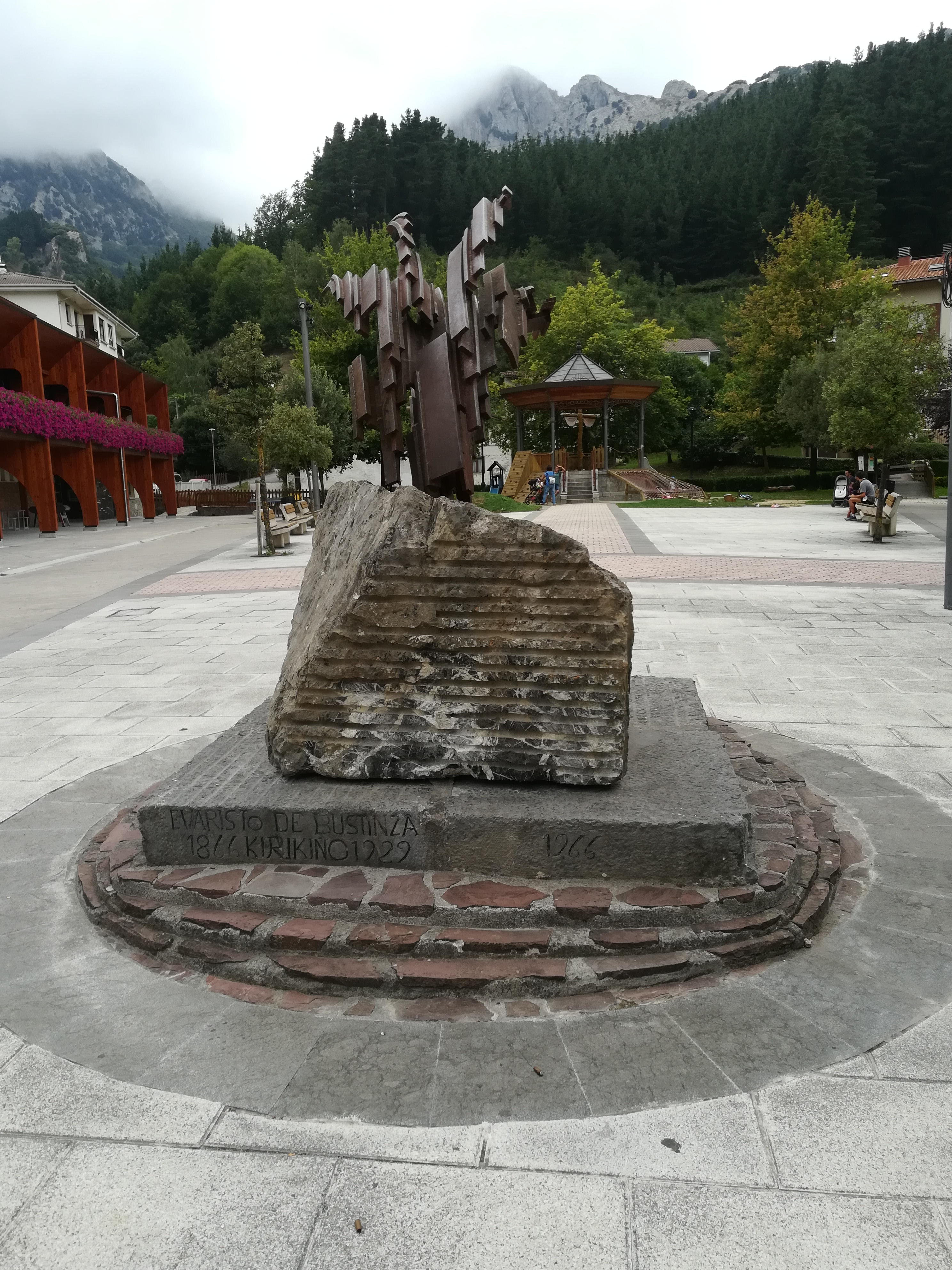 Evaristo Bustintza. Kirikiño. Escritor